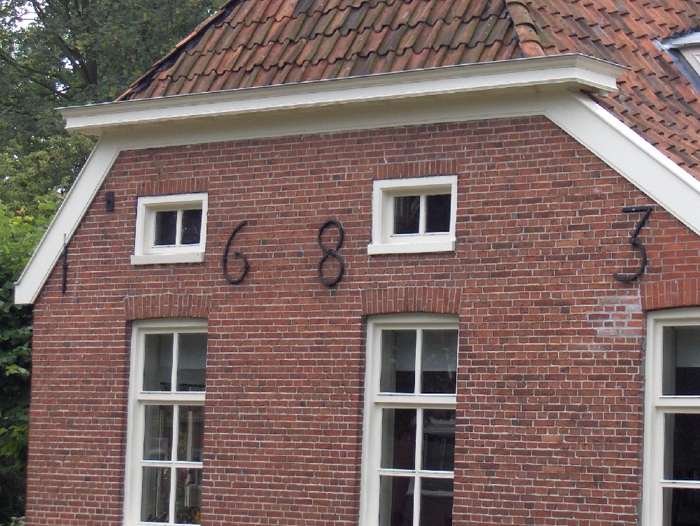 Hûs mei jiertal (muorre-ankers).